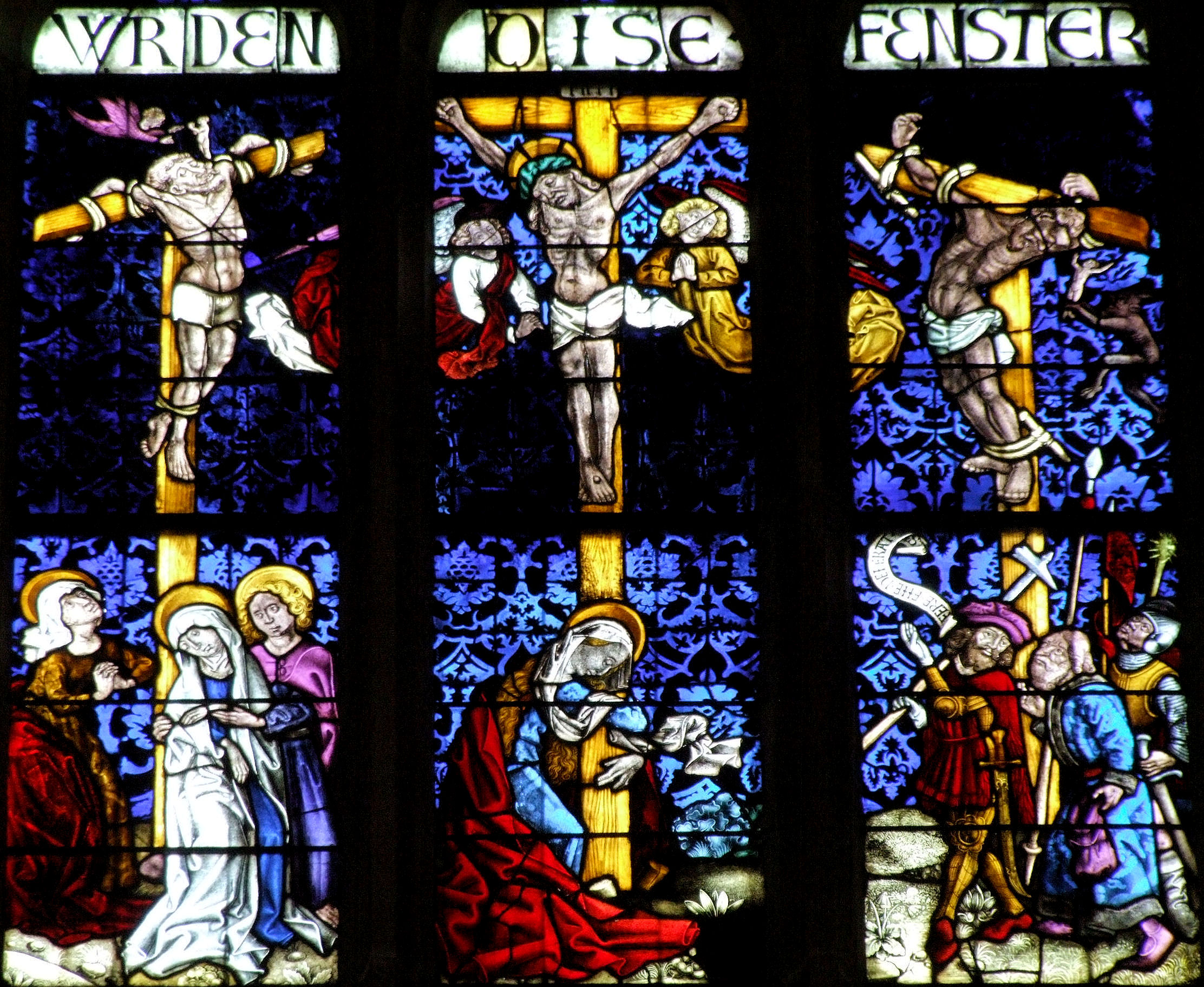 Walbourg - Eglise Sainte-Walburge - Vitrail de la Crucifixion